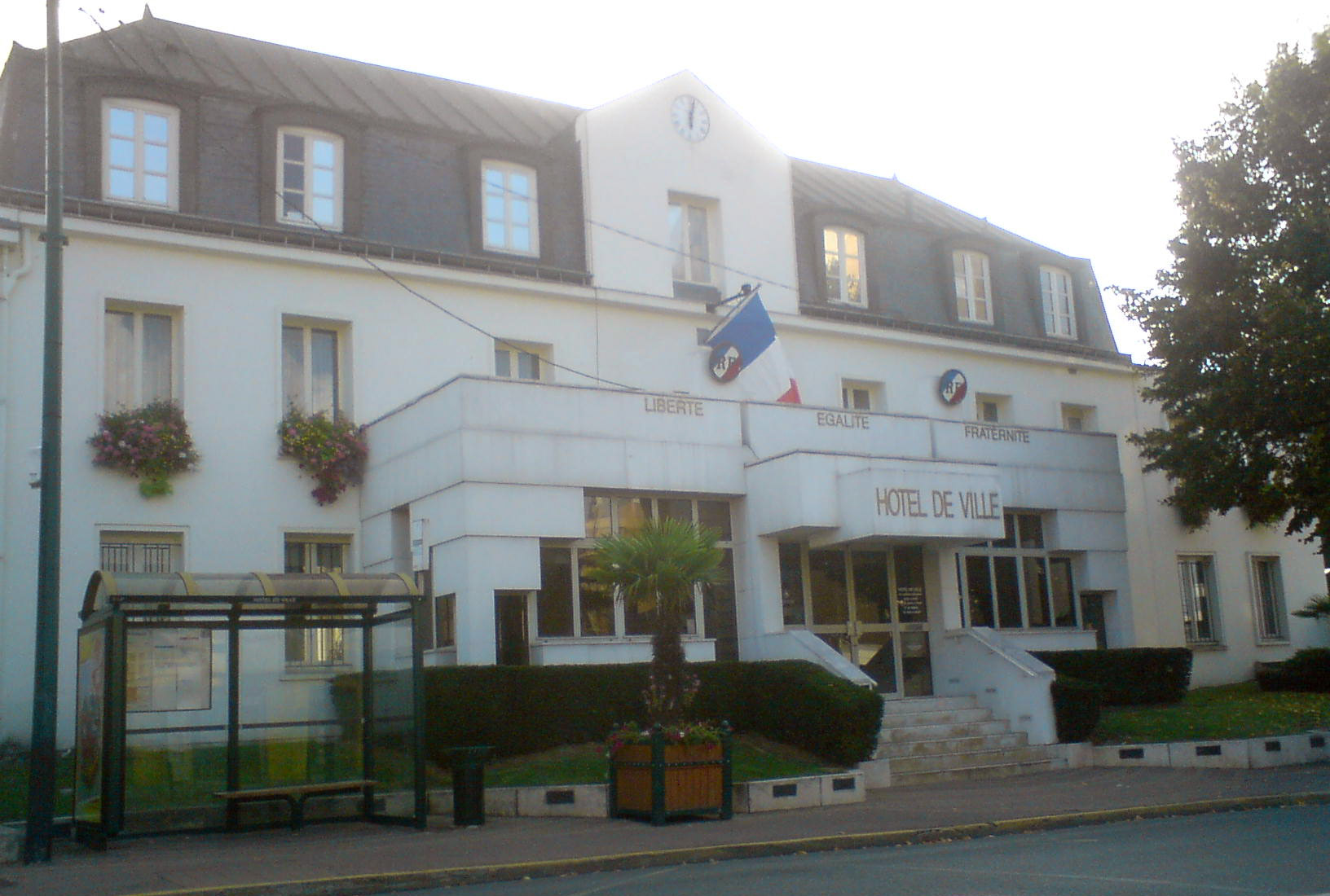 Hôtel de ville de Montgeron (Essonne)